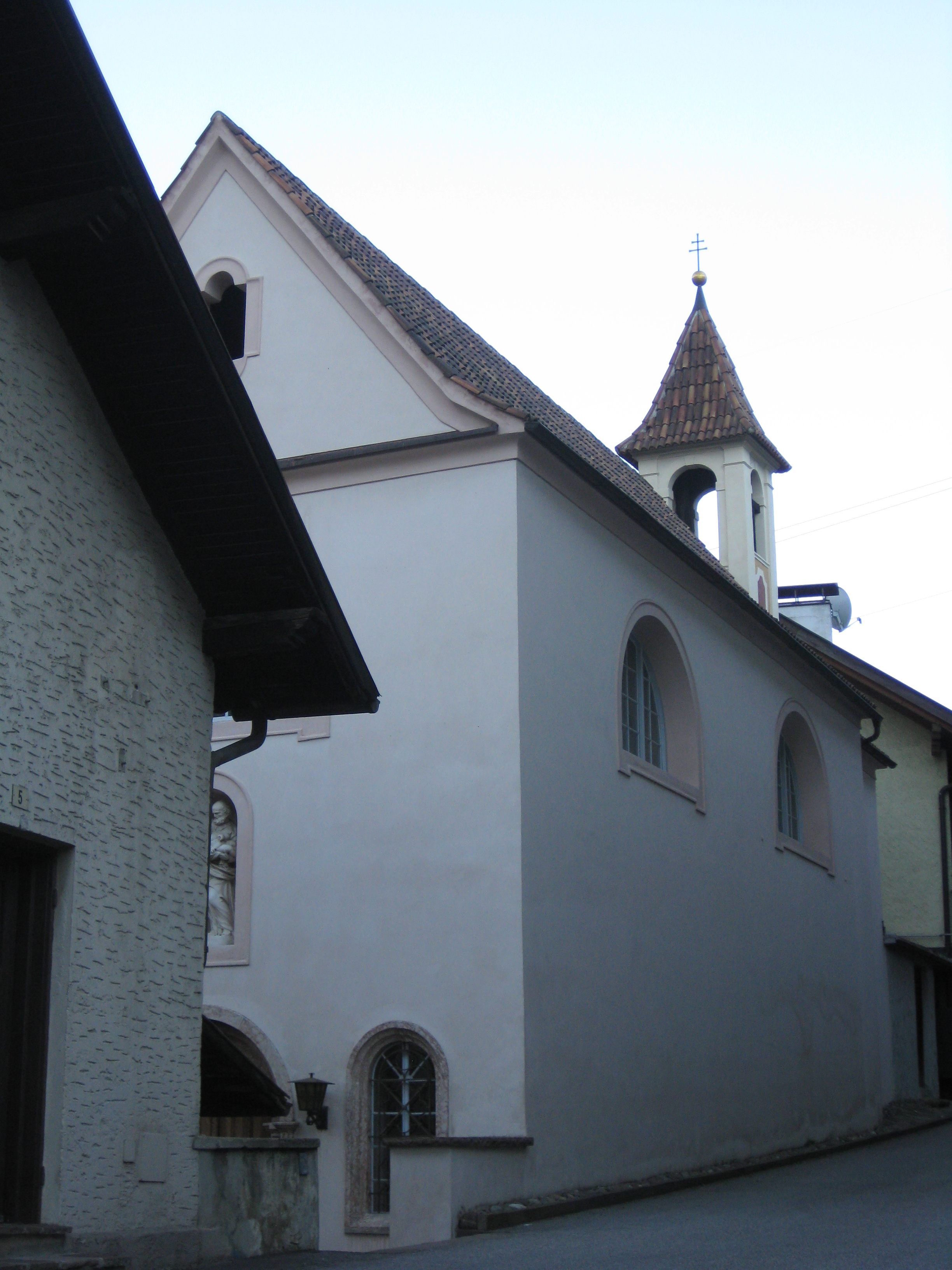 Maria-Hilf-Kirche in Kardaun (Gemeinde Karneid) in Südtirol